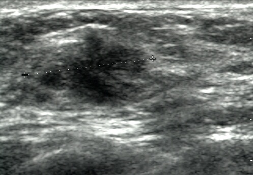 Mammakarzinom in der Sonographie als unscharfer echoarmer Herd